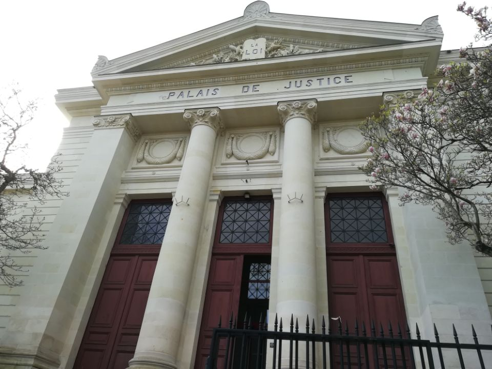 accueil du palais de justice, tribunal d'instance cholet 12 mars 2020